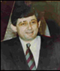 Atef Bseiso (1948-1992)